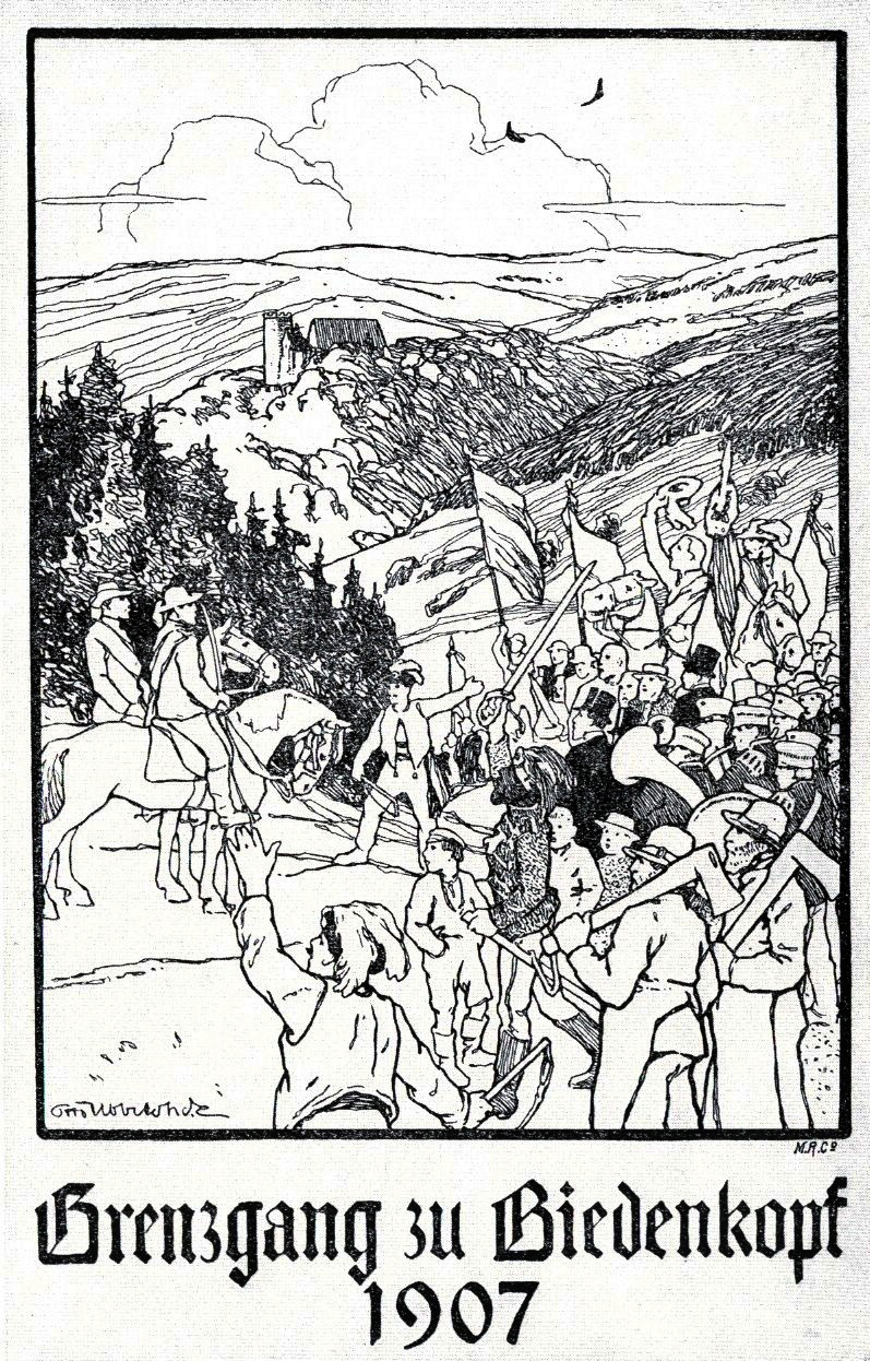 Zeichnung Grenzgang zu Biedenkopf 1907